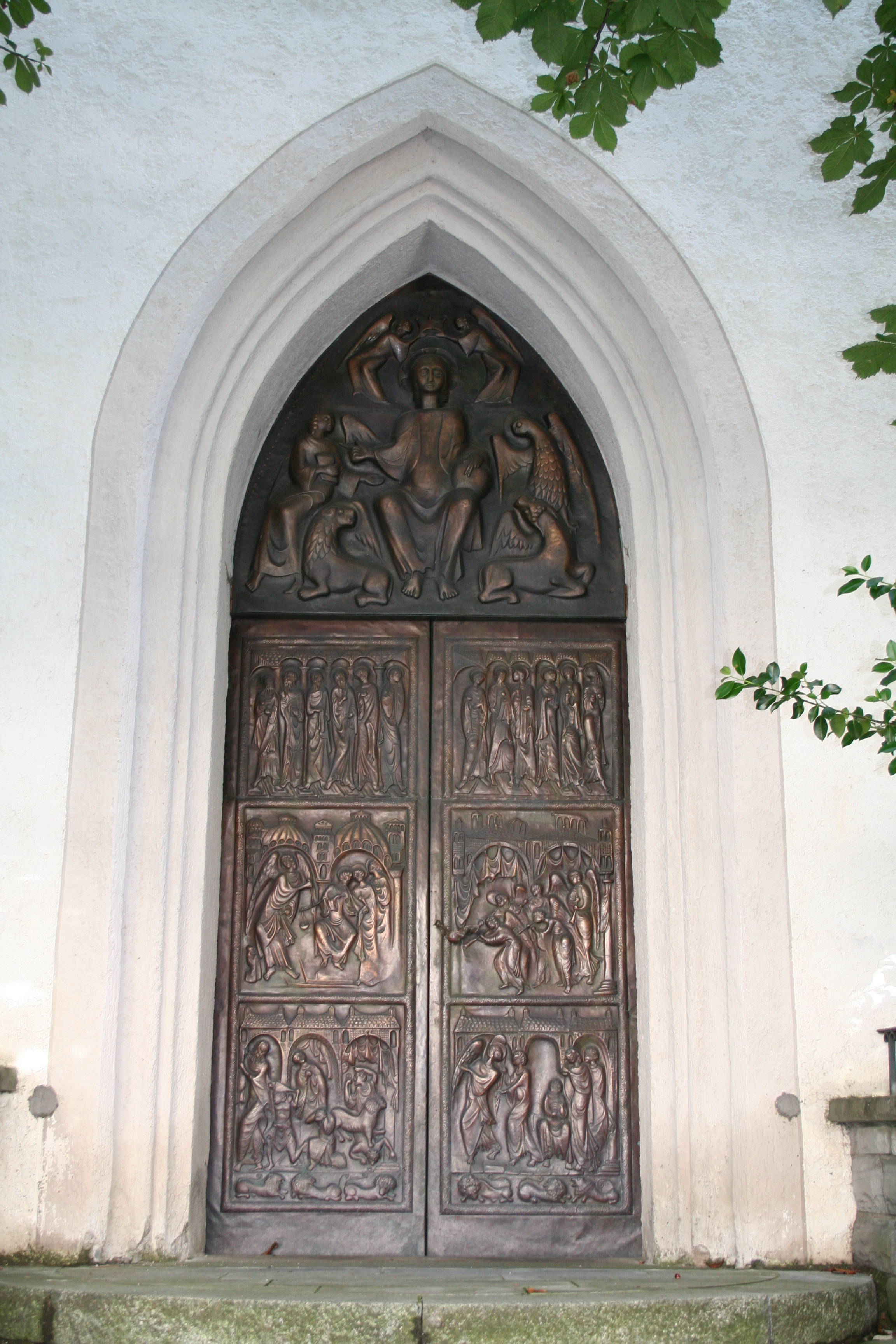 Katholische Pfarrkirche St. Johannes der Täufer, Oberstdorf